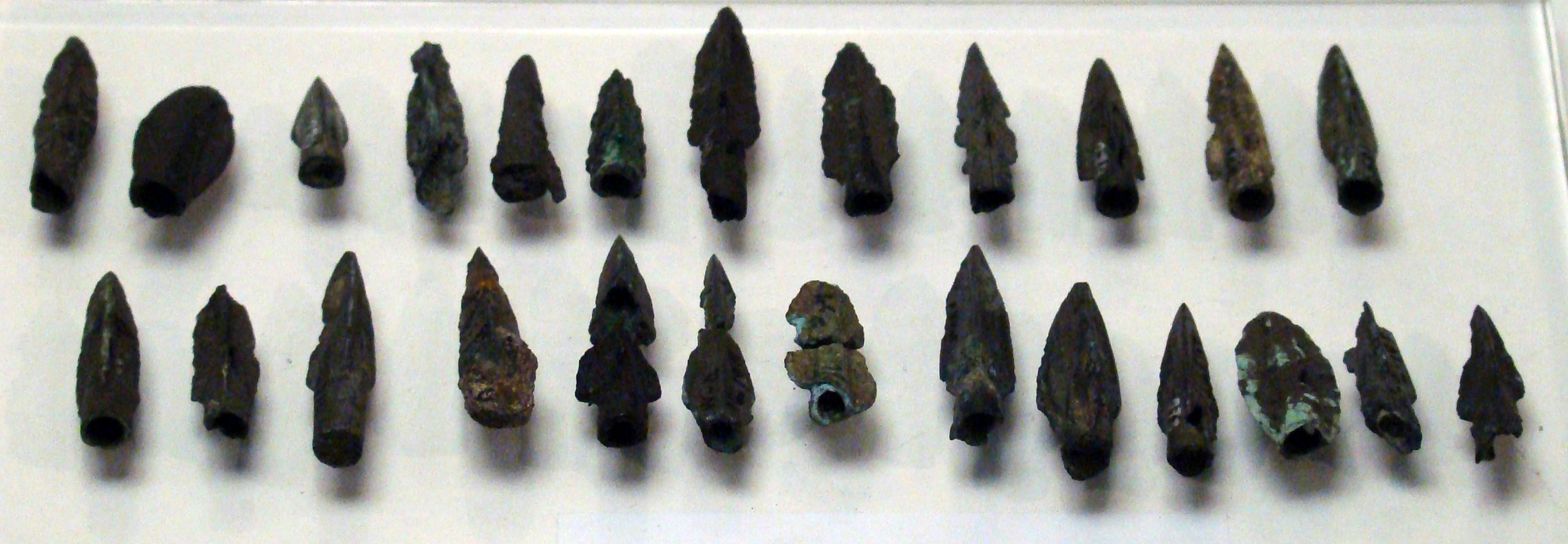 Scytyjskie grociki strzał. Muzeum Archeologiczne Środkowego Nadodrza w Świdnicy